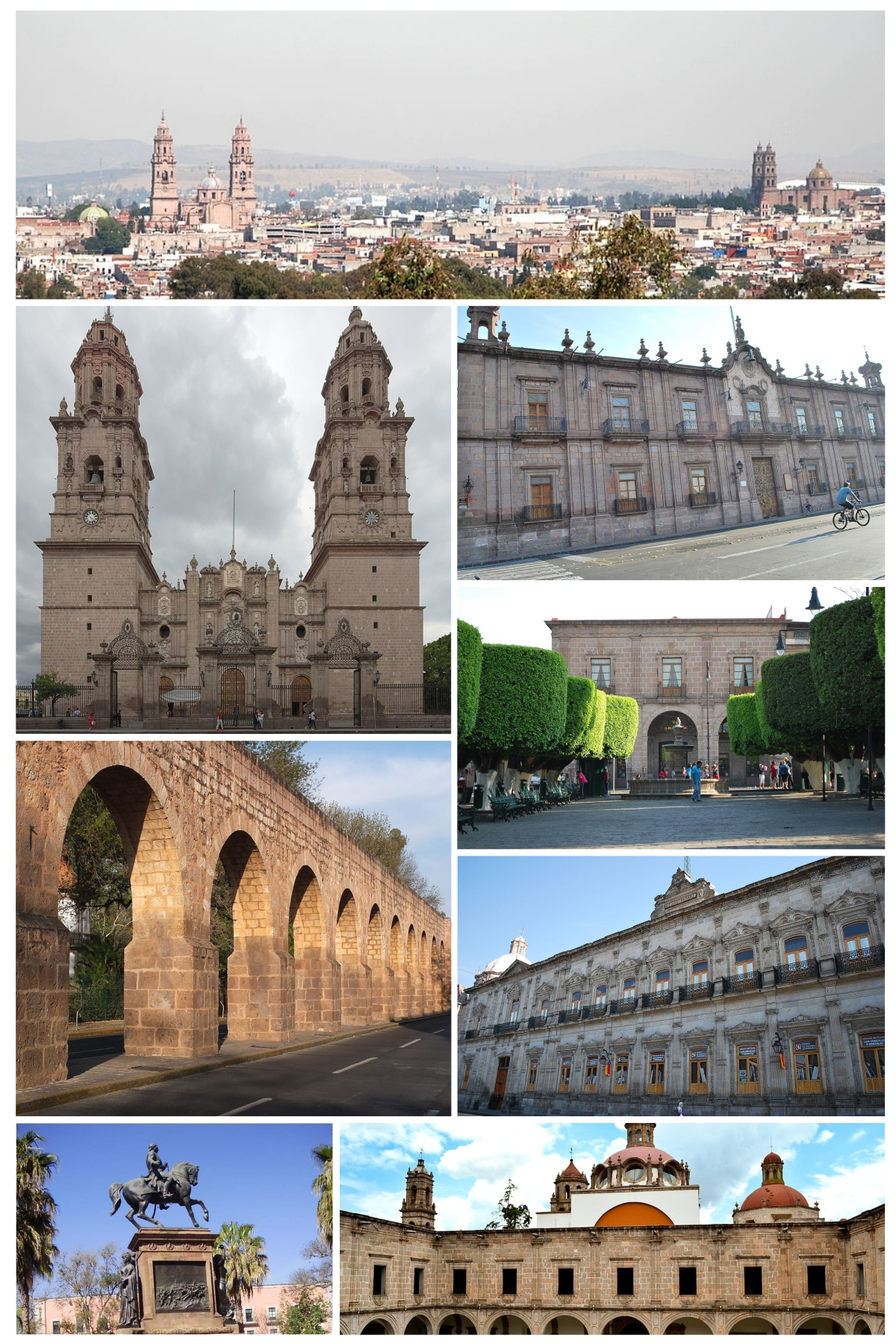 Morelia